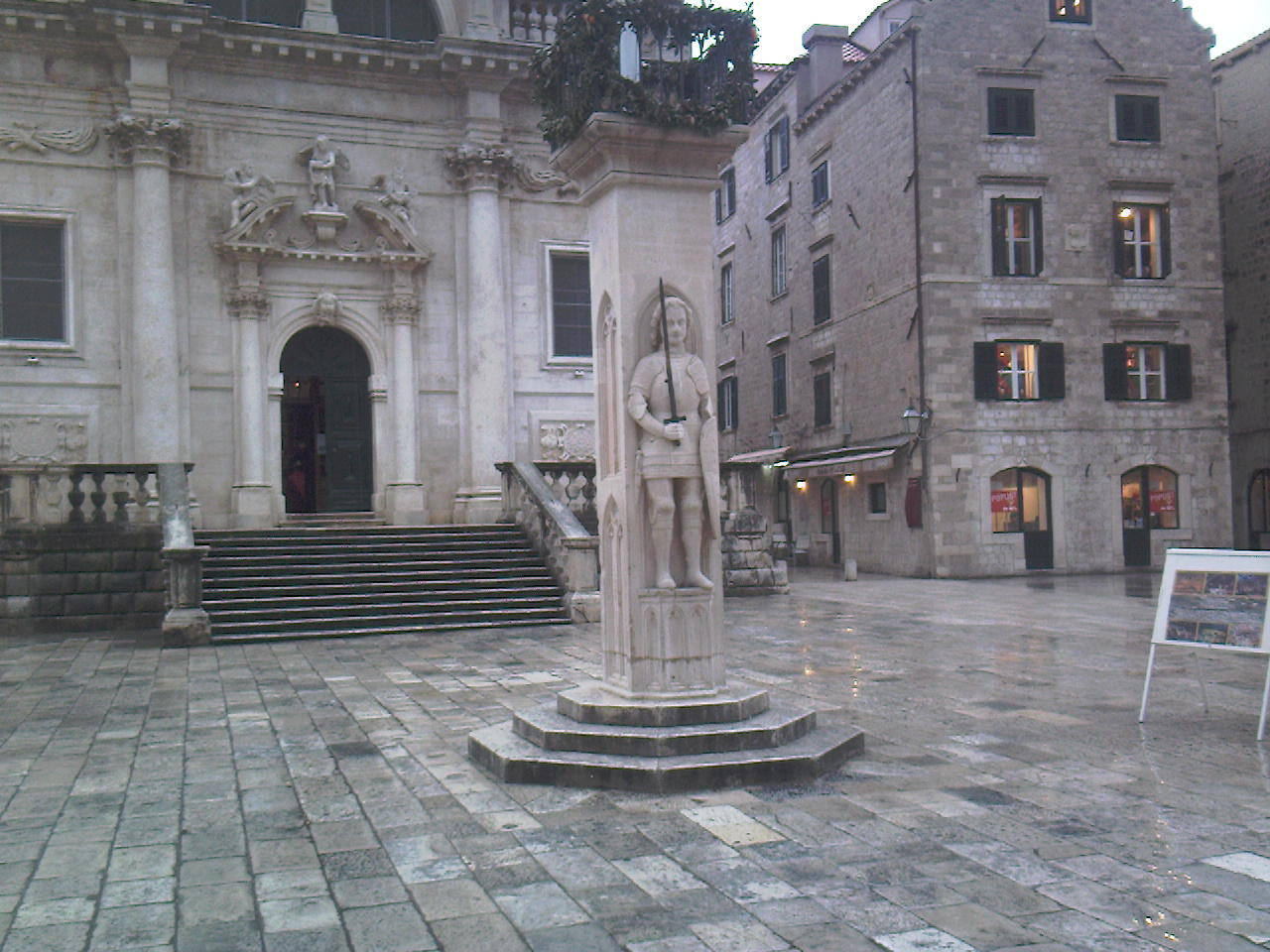 Orlandov kip na Stradunu u Dubrovniku Statue of Orlando in Dubrovnik